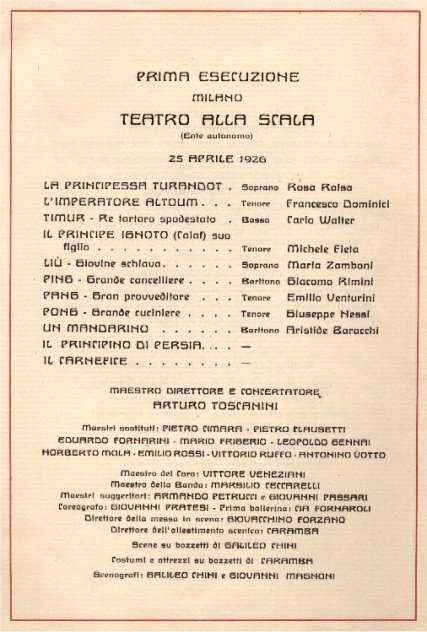 Personaggi del libretto d'opera "Turandot" di G. Adami e R. Simoni musica di Giacomo Puccini - edizioni G. Ricordi & C. Milano - Prima rappresentazione alla Scala di Milano 25 aprile 1926